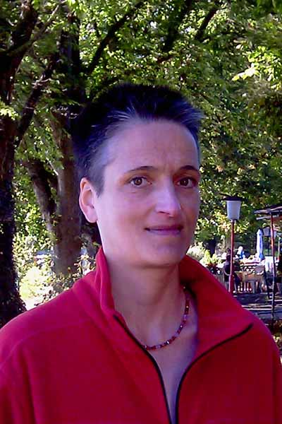 Porträtaufnahme Christine Kabus